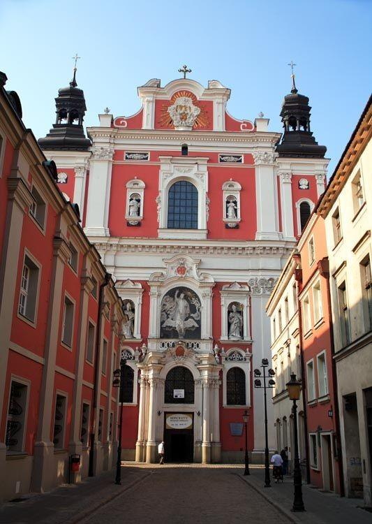 Polska by Ewa and Marek Wojciechowsy